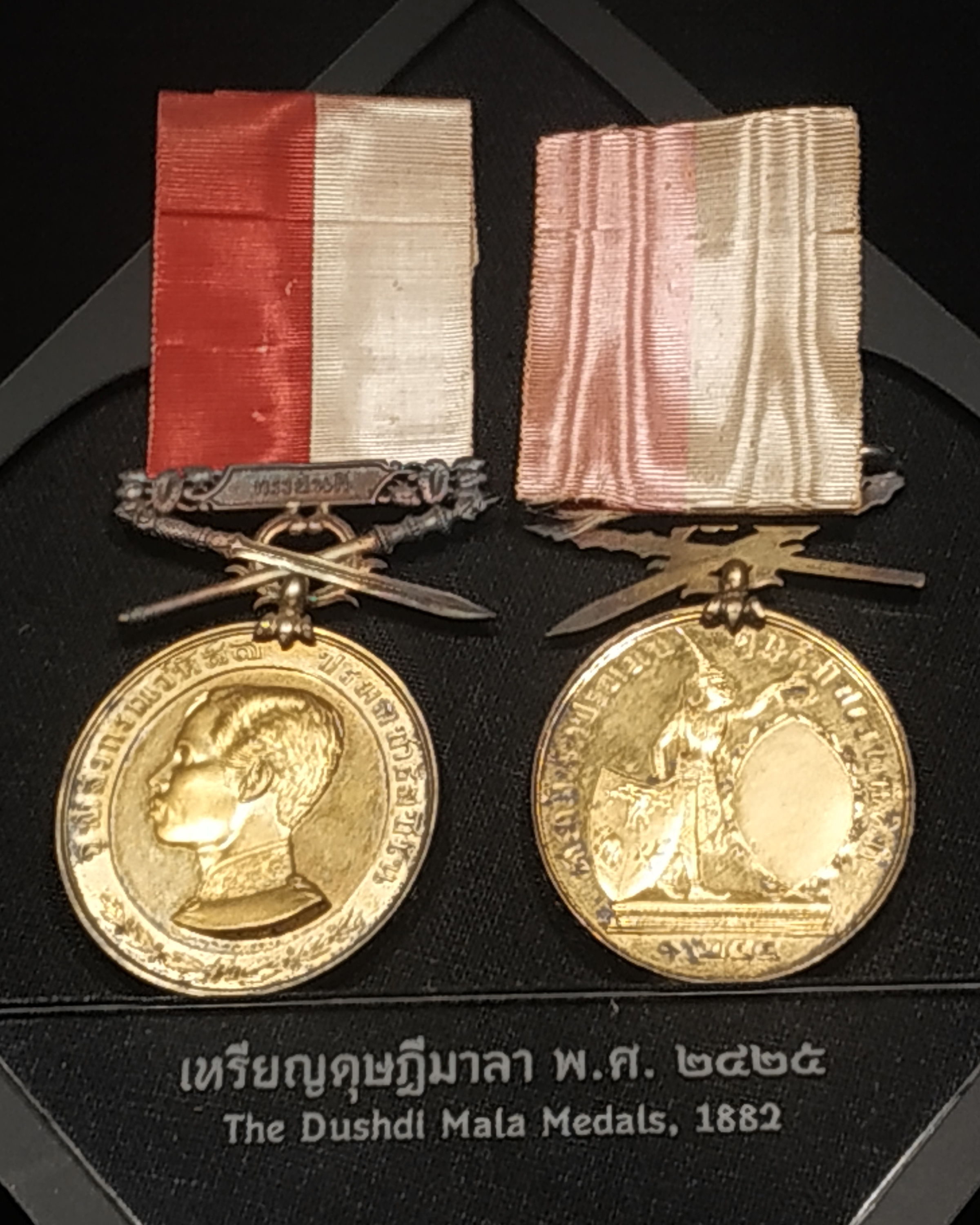 เหรียญดุษฎีมาลาทอง ไม่ประดับเข็ม สำหรับบุรุษ (ซ้าย) ด้านหน้า แพรแถบสมาชิกฝ่ายทหาร (ขวา) ด้านหลัง แพรแถบสมาชิกฝ่ายพลเรือน บันทึกภาพจากพิพิธภัณฑ์เหรียญกษาปณานุรักษ์ ถนนจักรพงษ์ เขตพระนคร กรุงเทพมหานคร ประเทศไทย เมื่อวันที่ 29 กุมภาพันธ์ พ.ศ. 2563